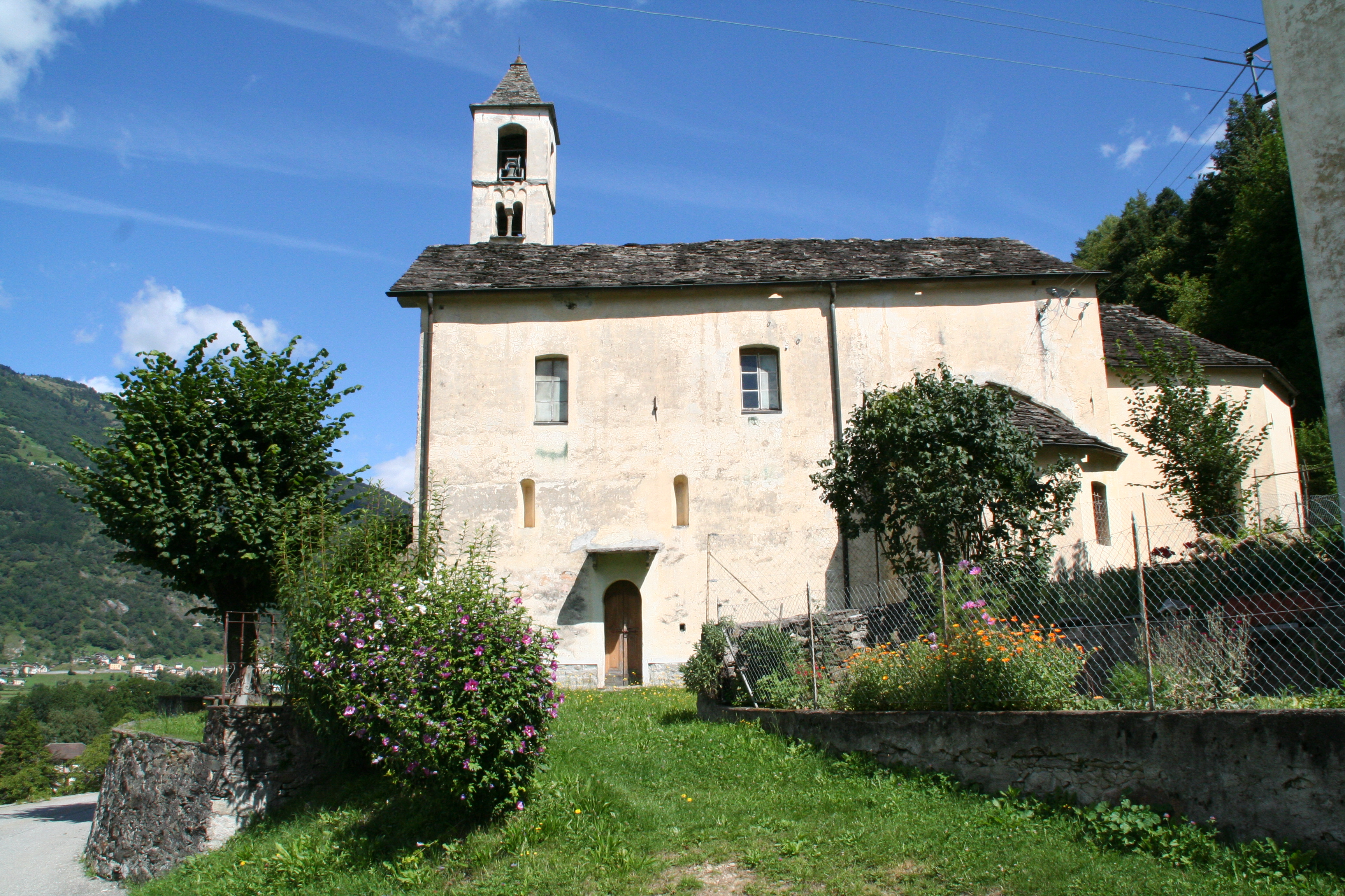 Chiesa dei Santi Pietro e Paolo a Lottigna, frazione di Acquarossa